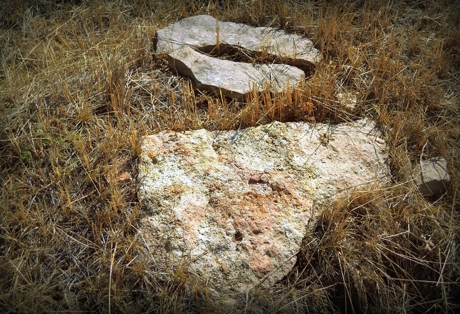 Иволгинское городище. Бурятия, Улан-Удэ